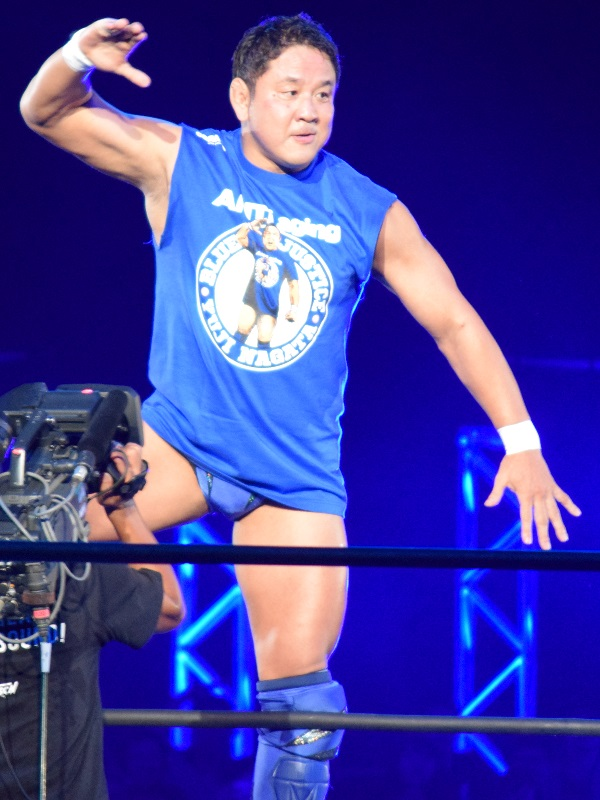 2015年8月1日 大阪府立体育会館 「G1 CLIMAX 25」 永田裕志